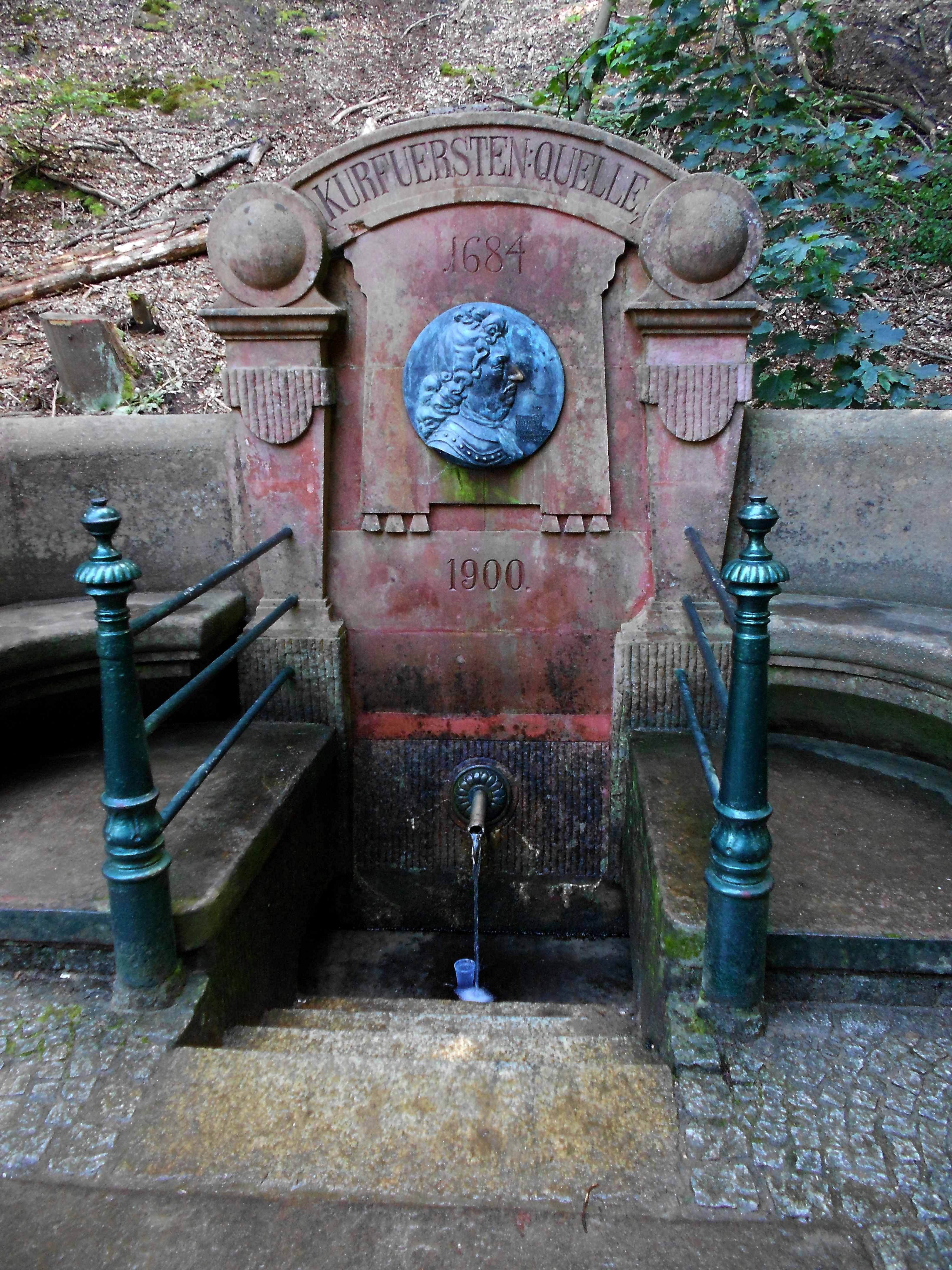 Fachklinik und Moorbad Bad Freienwalde